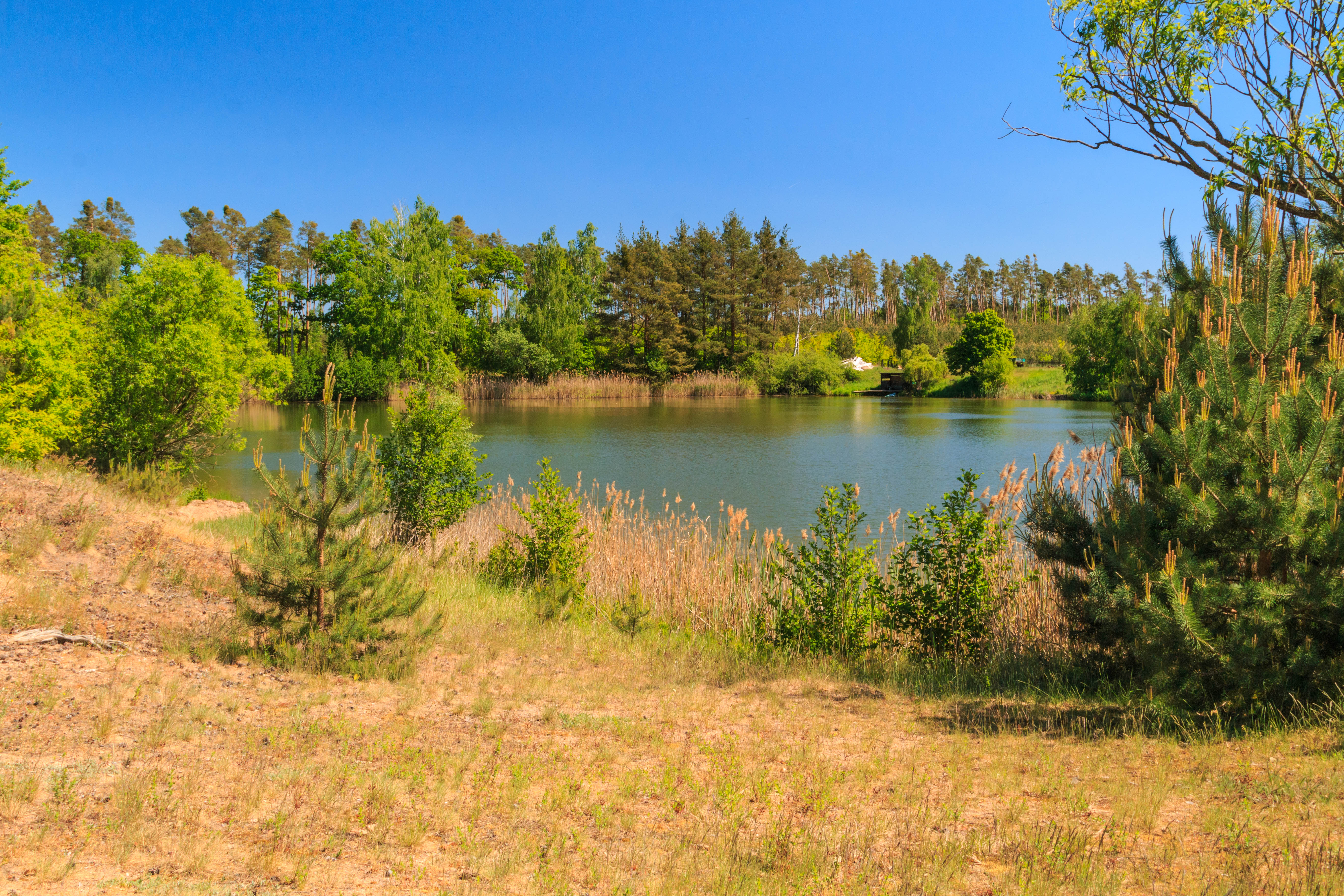 Písník K Borku ve Svinarech Project: Vodstvo.